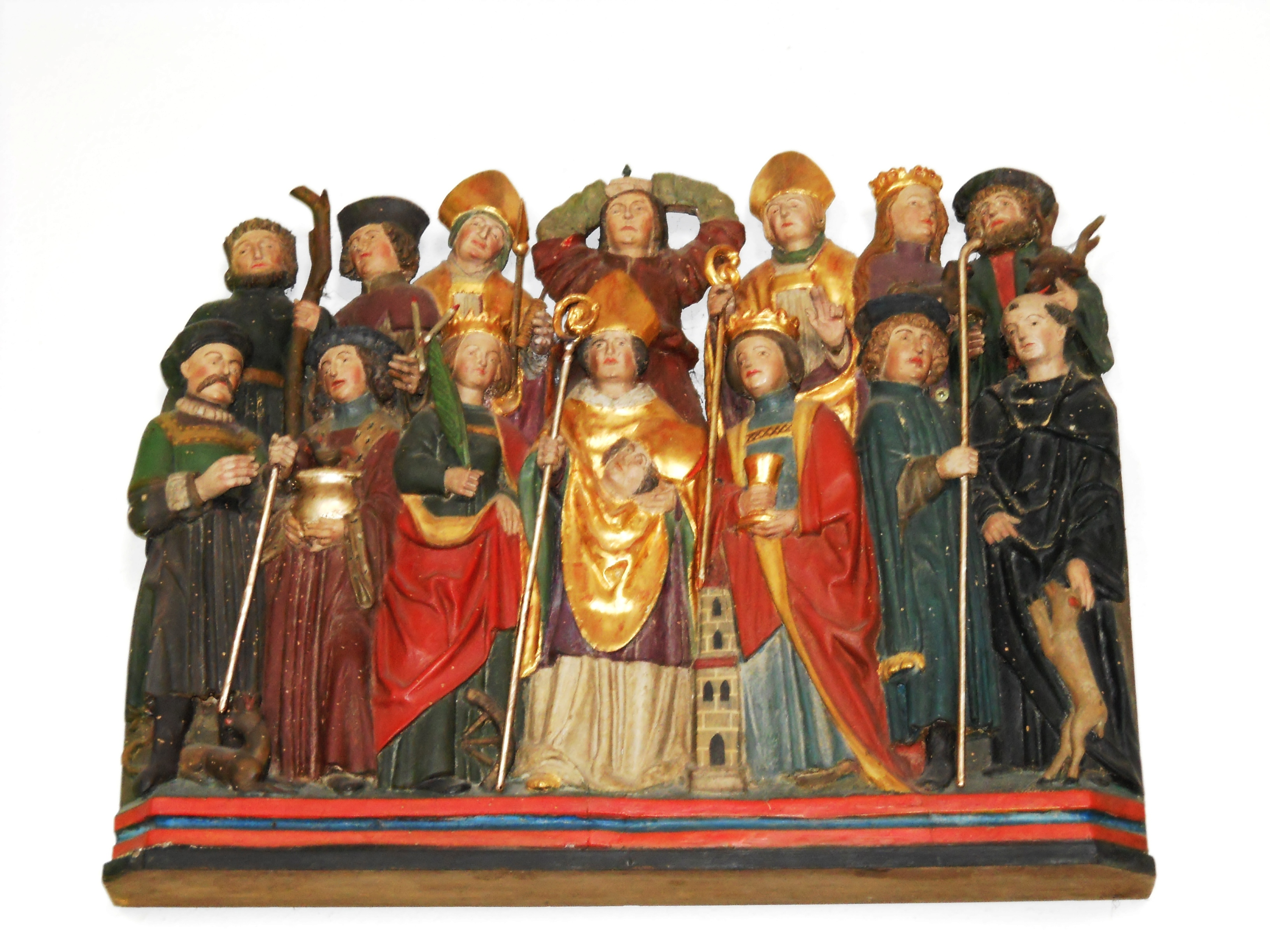 14-Nothelfer-Relief von ca. 1500 in der Kirche St. Ägidius in Erkertshofen im Landkreis Eichstätt (Oberbayern)